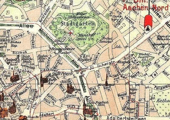 Ausschnitt aus einem Aachener Stadtplan (1913)